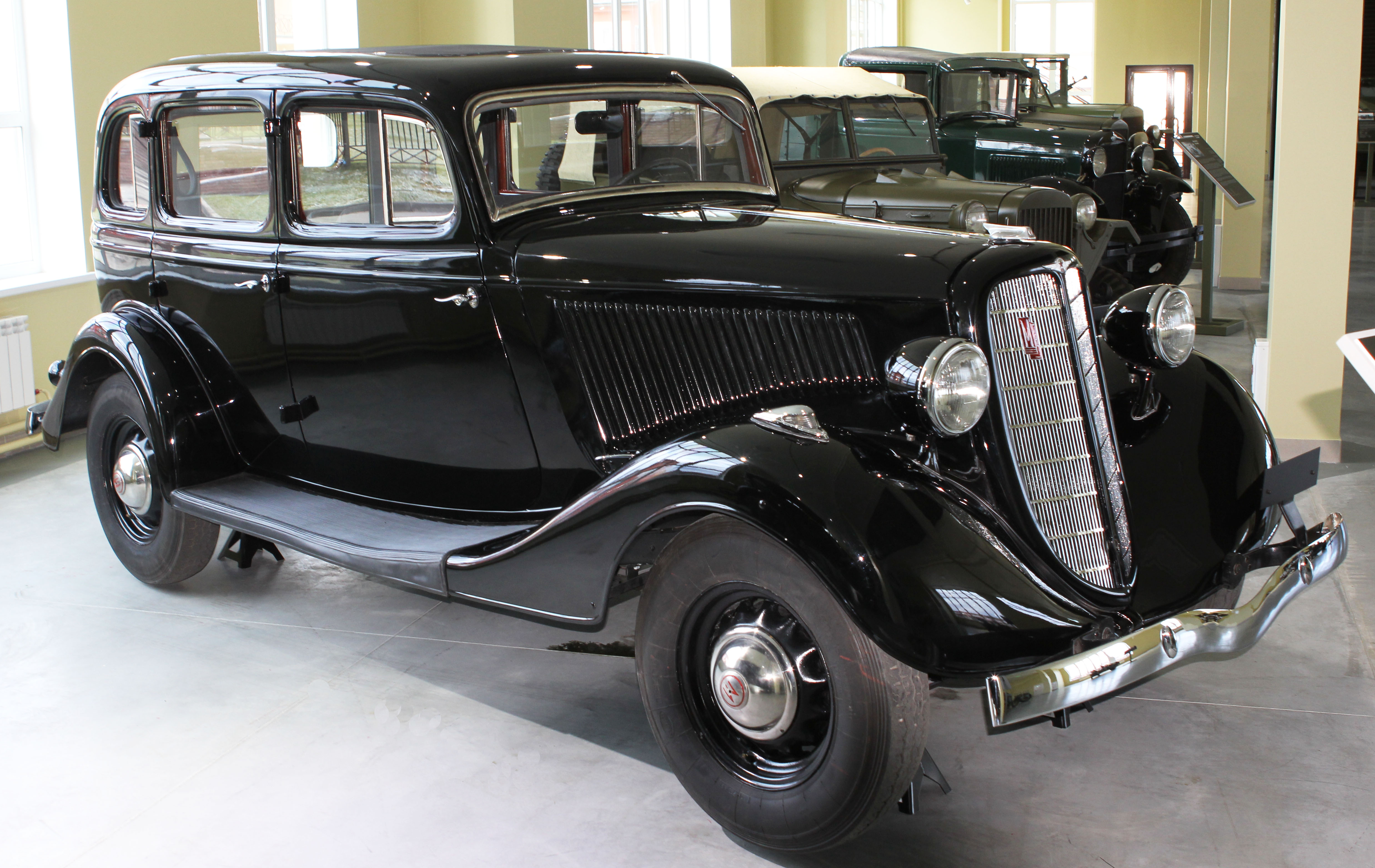 Автомобиль ГАЗ-М-1 в Музее отечественной военной истории